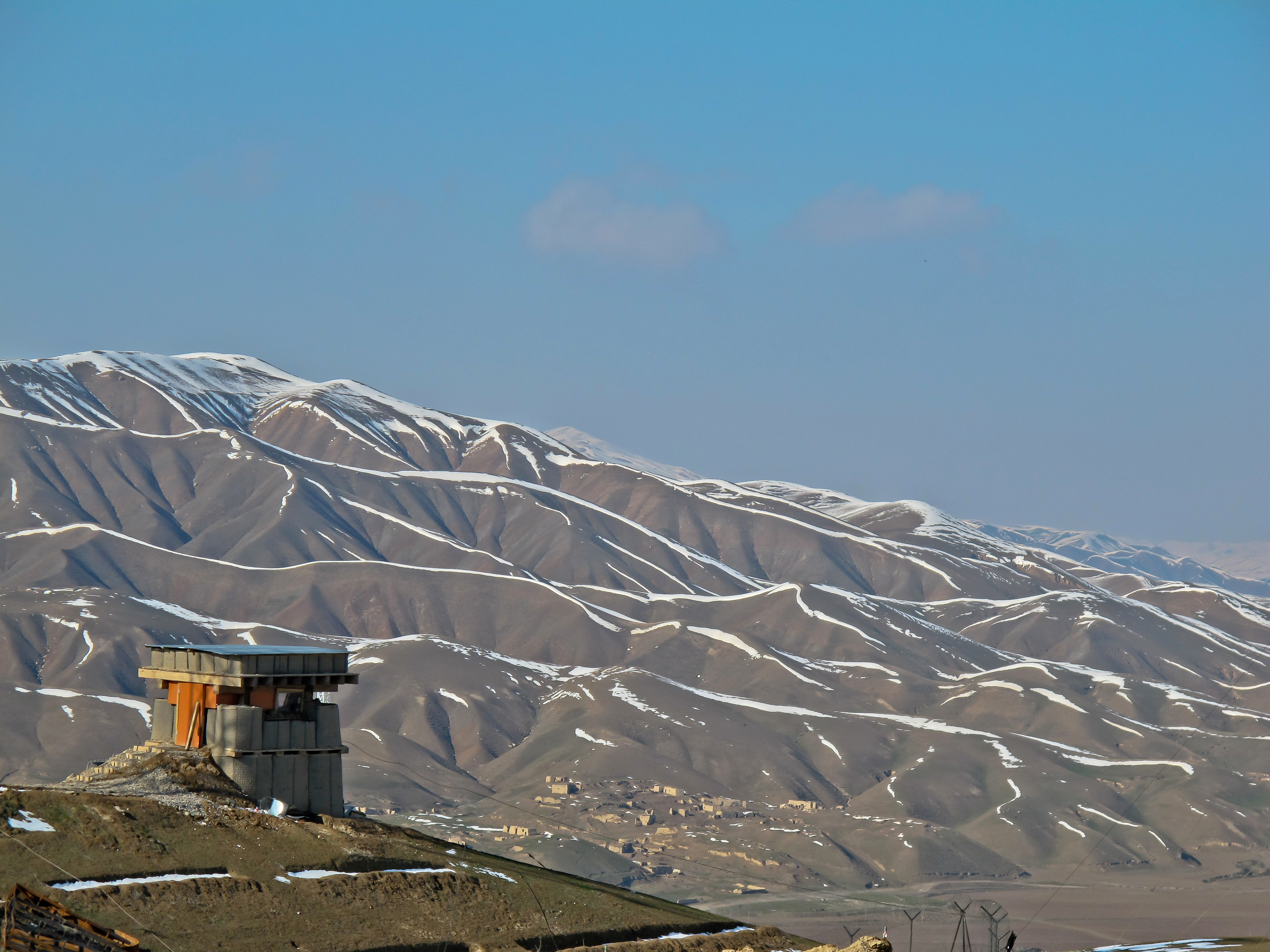 Verteidigungsminister Thomas de Maizière traf am Montag dem 5. März um 3.30 Uhr mitteleuropäische Zeit (7 Uhr Ortszeit) zu einem seit längerem geplanten Überraschungsbesuch in Termez ein. Unter anderem stehen auf seinem Programm Gespräche mit den ungarischen Partnern des regionalen Wiederaufbauteam (PRT[Provincial Reconstraction Team]) in Pol-i-Khomri. Schwerpunkt der Reise ist der Besuch der deutschen Operationsbasis, dem OP-North (Observation Post North) im Baghlan-Tal. Quelle: Bundeswehr